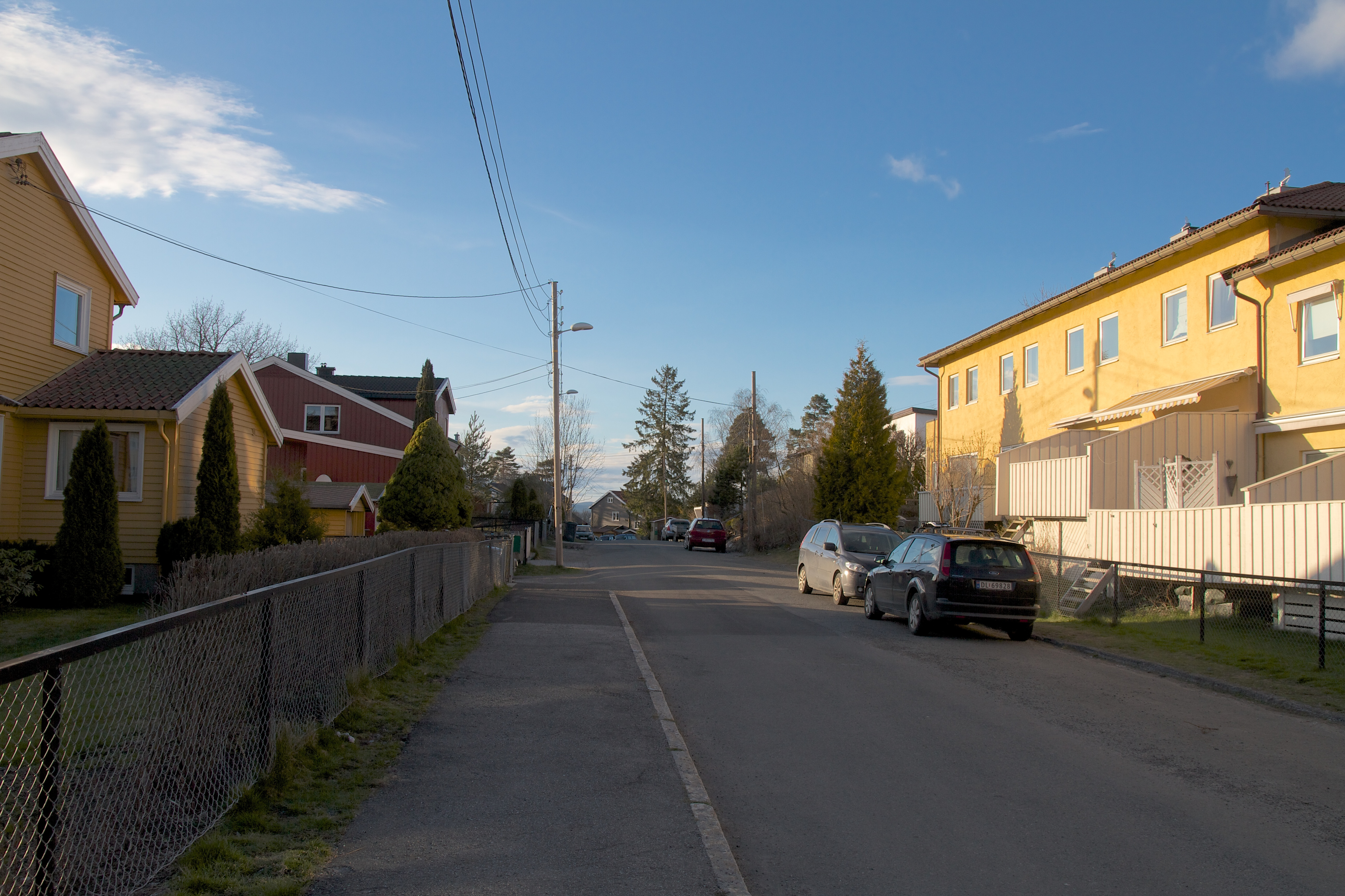 Bølersvingen på Bøler i Oslo.